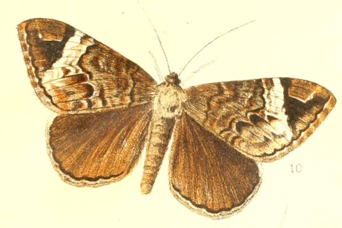 Tolna versicolor